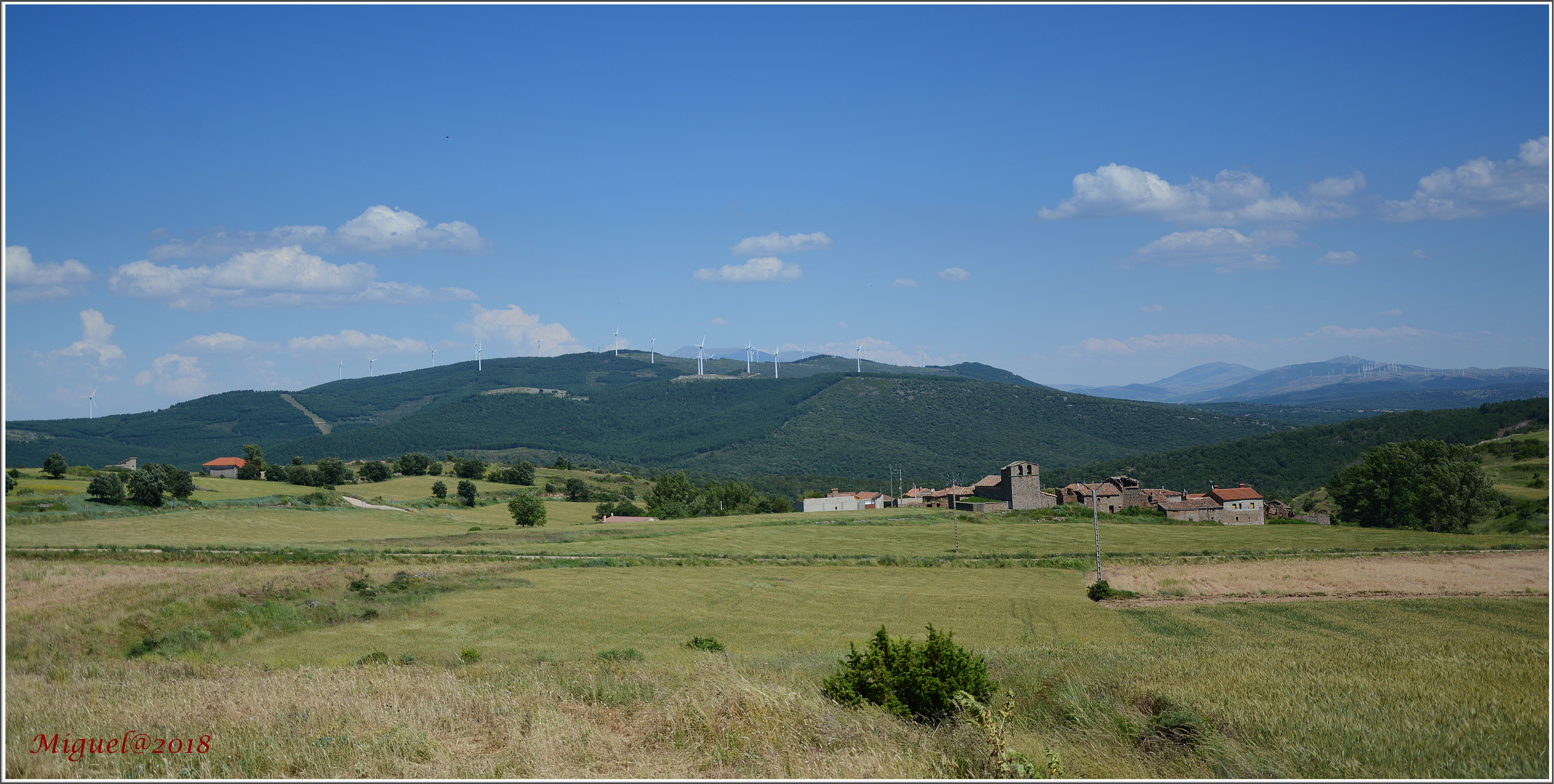 El Espino. Soria.